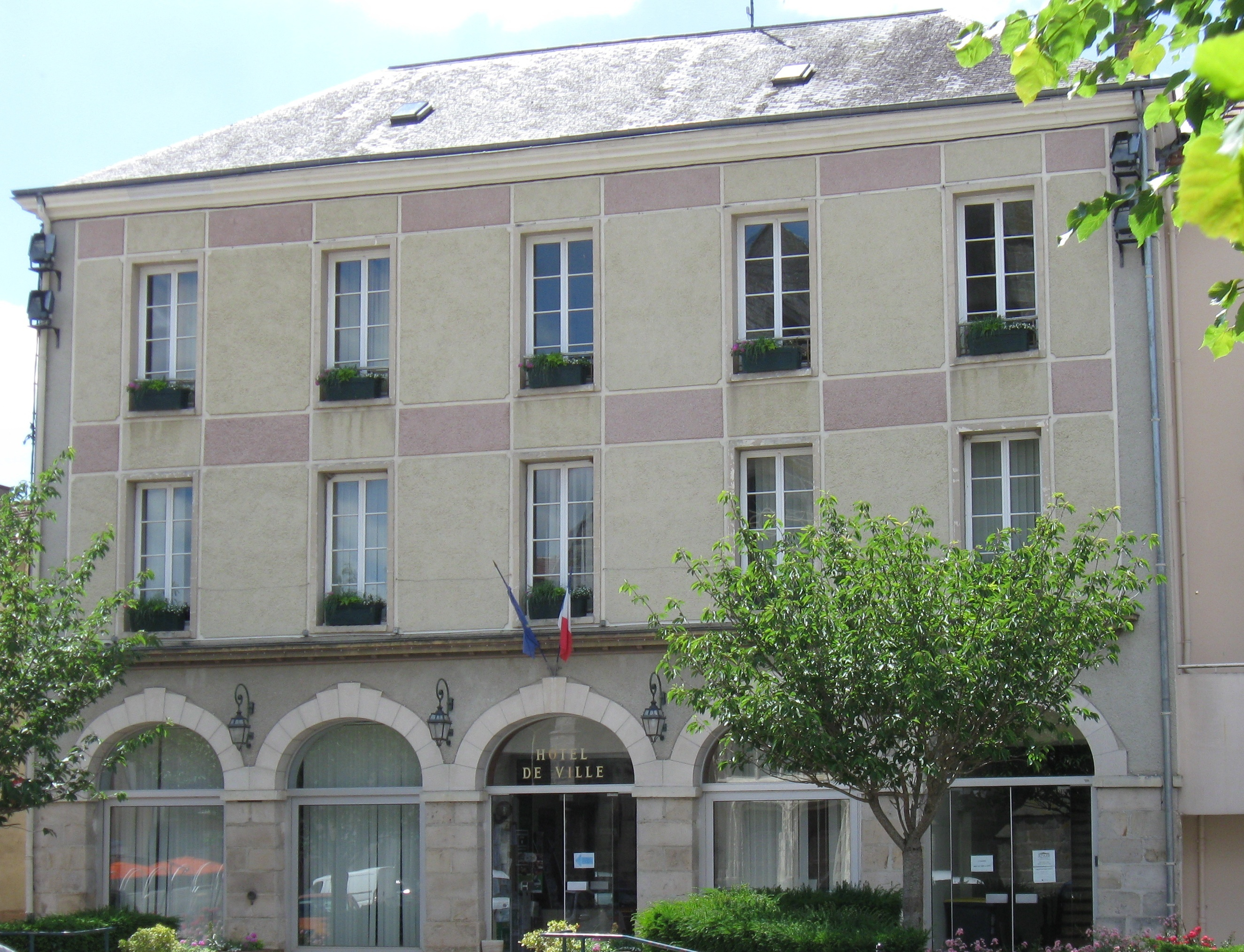 Mairie de Villenauxe-la-Grande. (Aube, région Champagne-Ardenne).